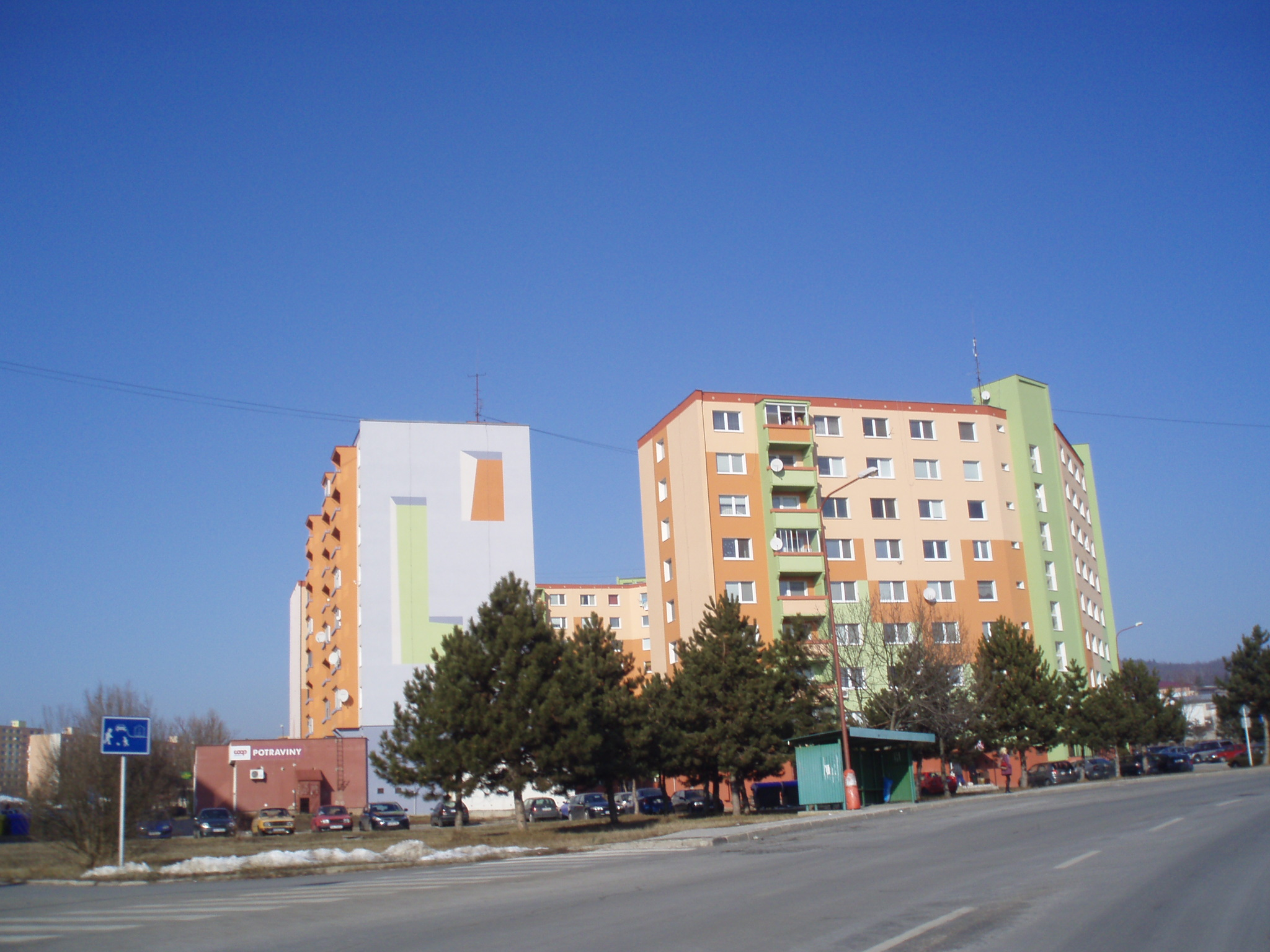 Činžiaky v časti Dolina, Veľký Krtíš